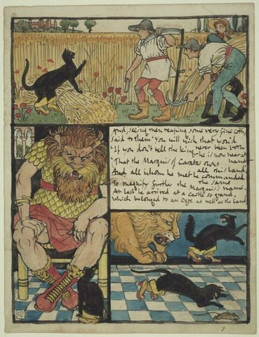 Гравюры по рисункам Крейна к сказке "Кот в Сапогах"